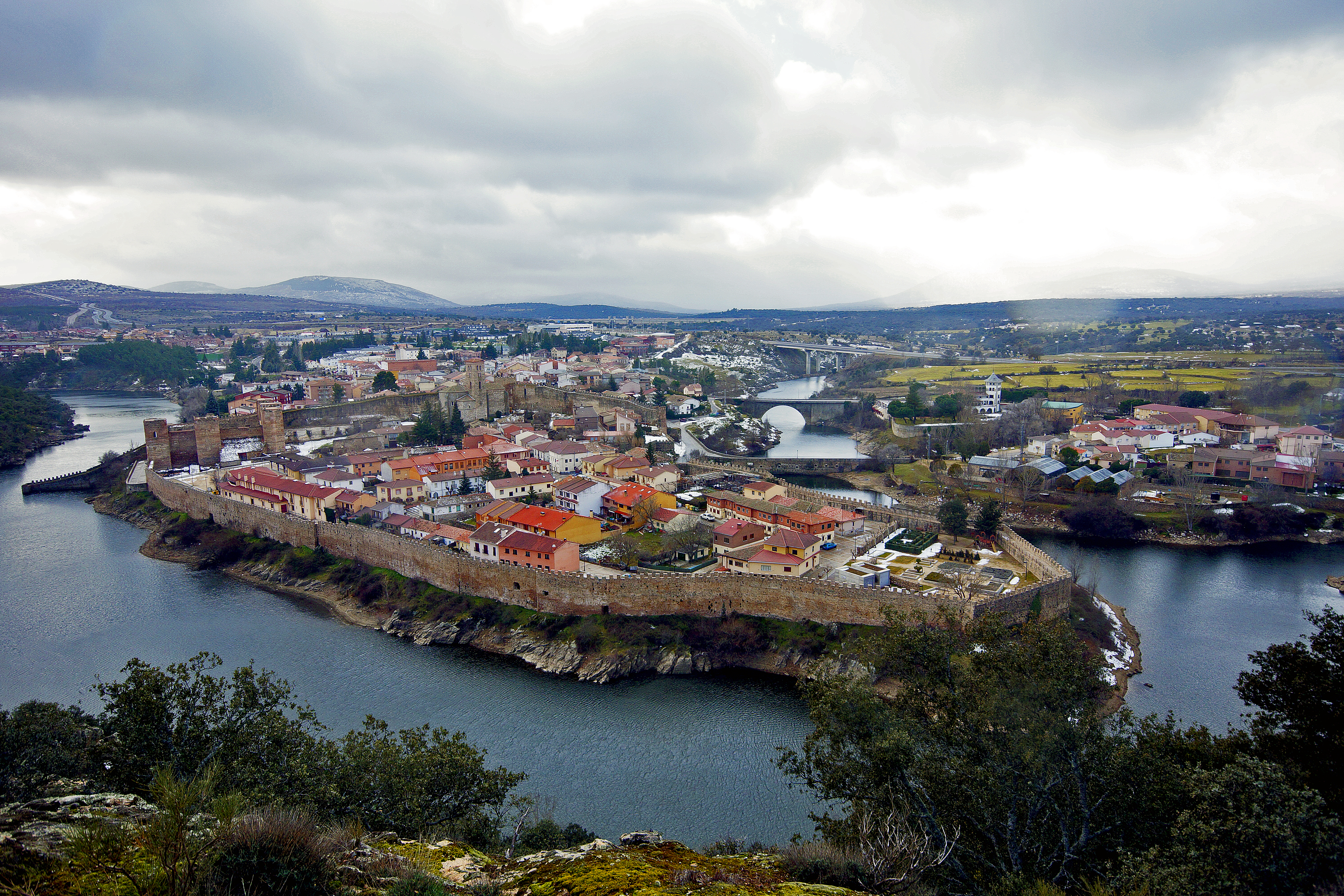 Cuenca del río Lozoya y Sierra Norte This is a photography of a Special Area of Conservation in Spain with the ID: ES3110002. Natura2000 entry, EEA entry